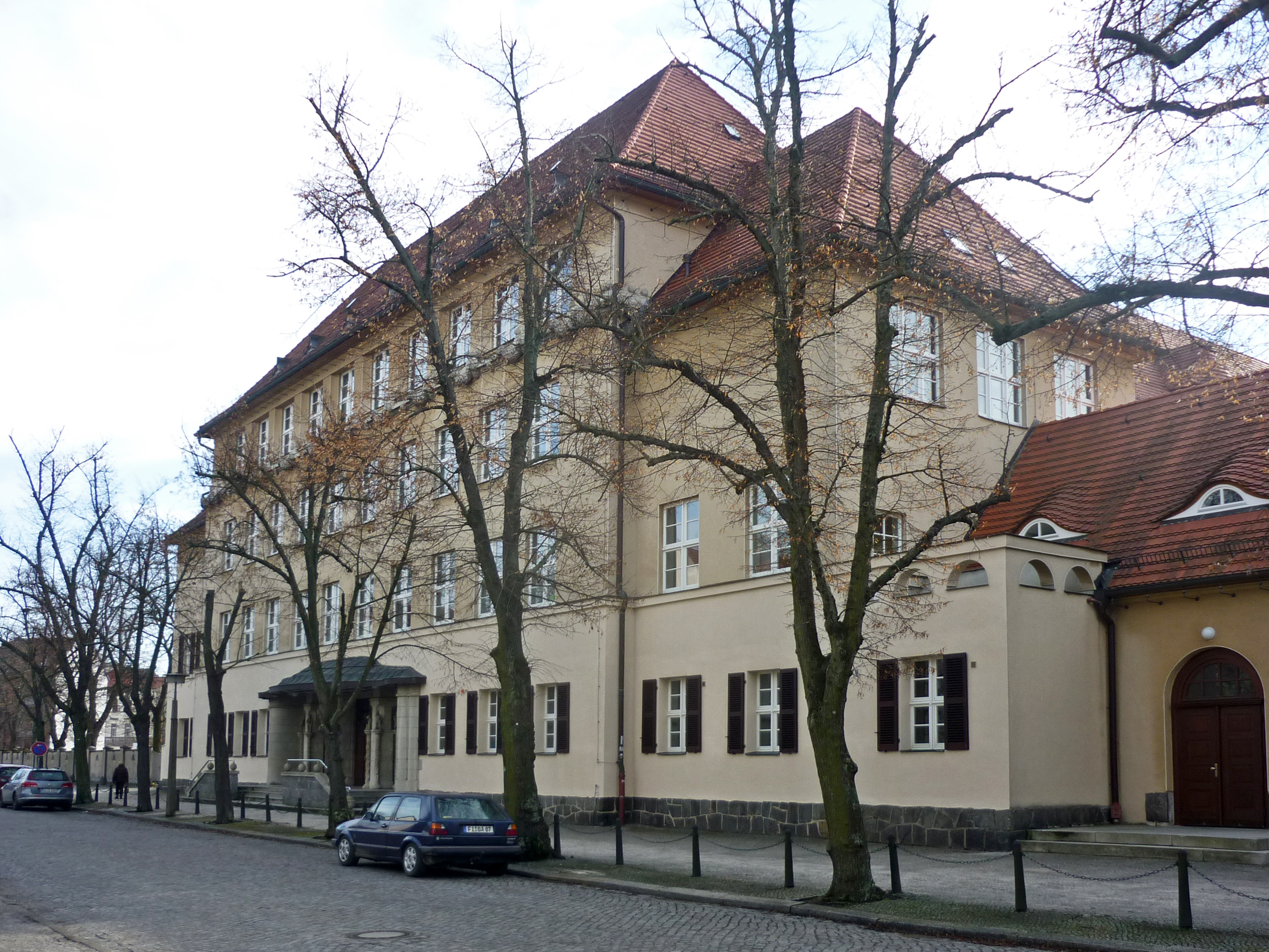 Sängerstadt-Gymnasium Finsterwalde